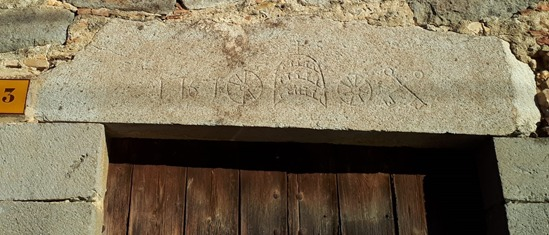 Llinda de porta amb l'escut adoptat pel monestir